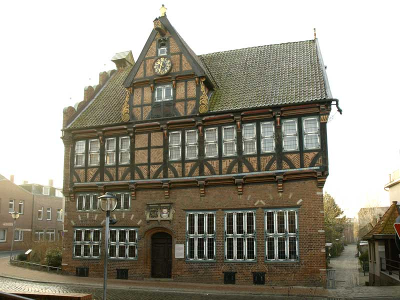 Altes Rathaus von Wilster